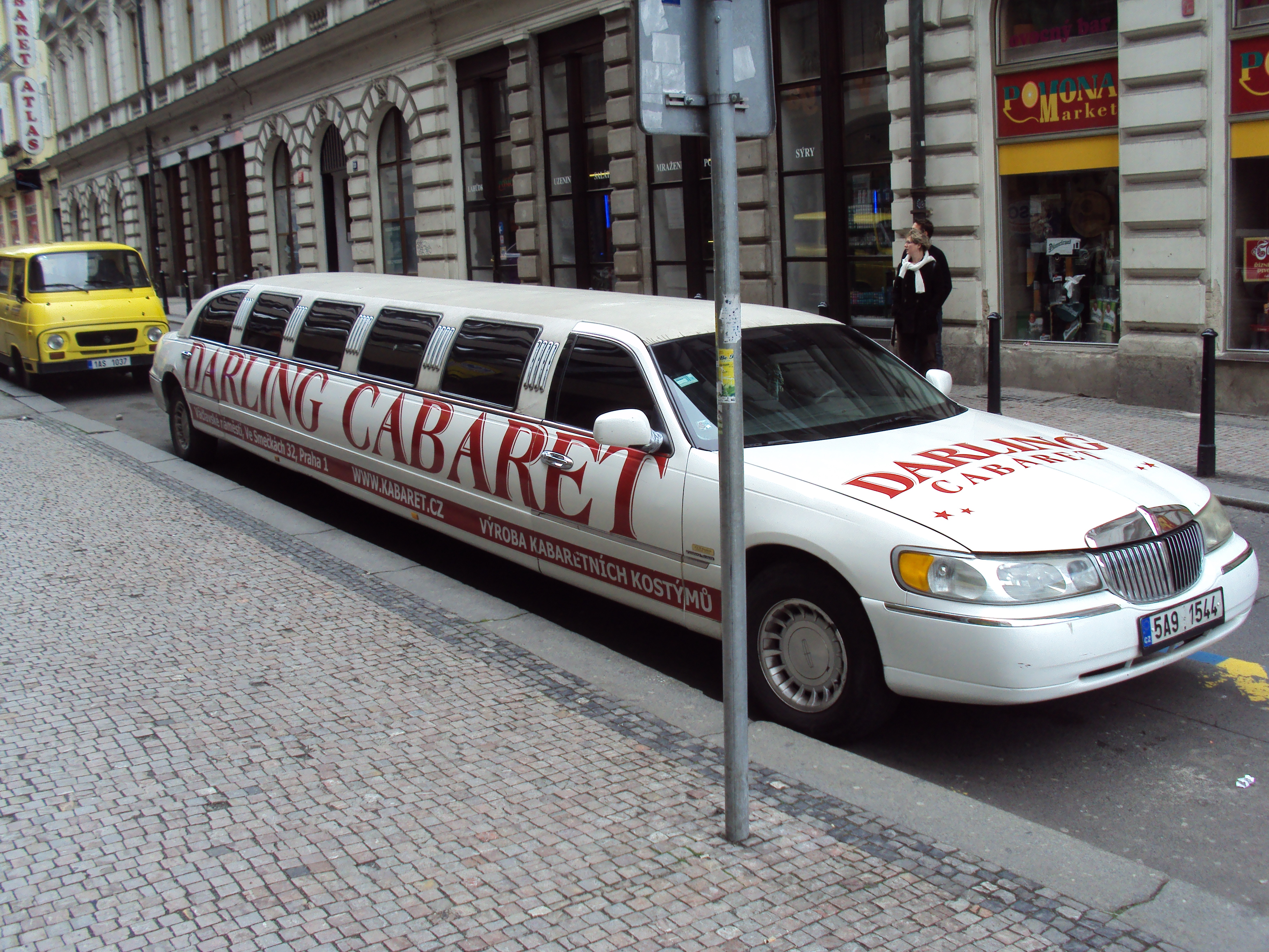 Reklamní limusina Cabaretu Praha parkuje u Václaváku